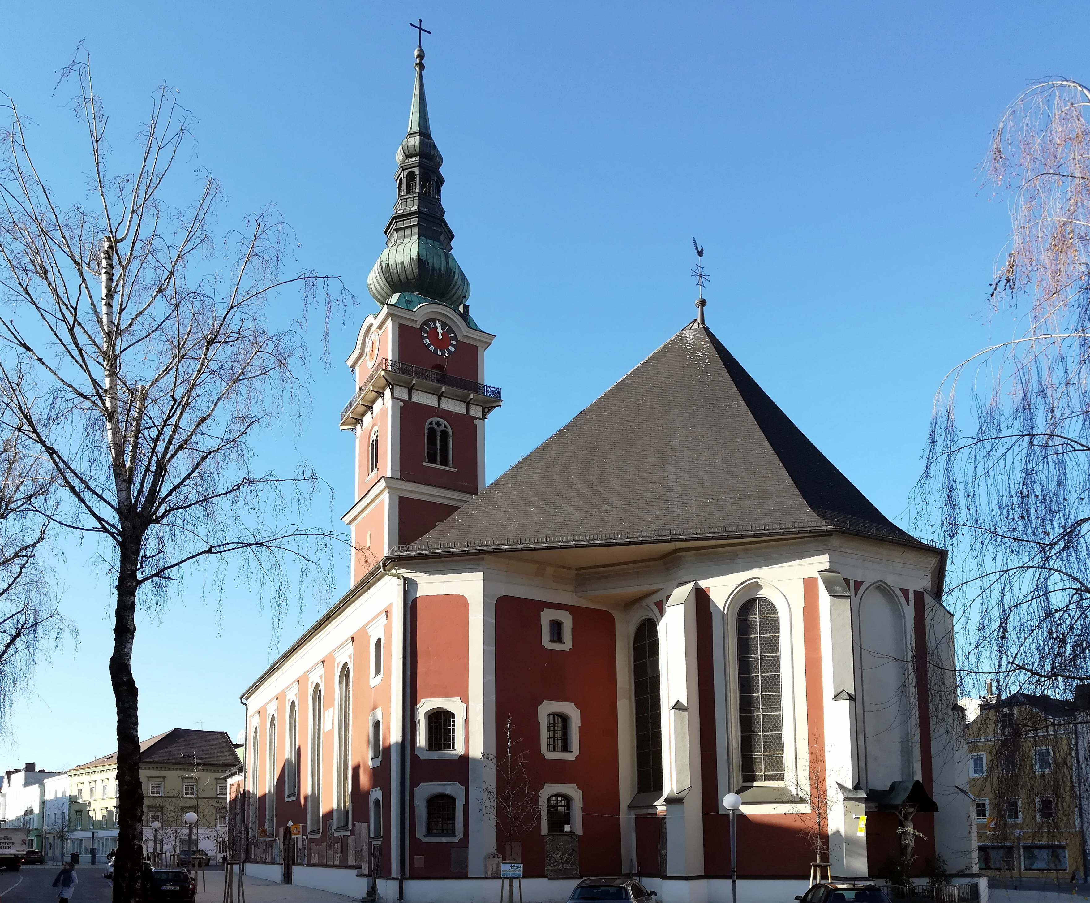 Die Pfarrkirche Ried im Innkreis steht in der Stadtgemeinde Ried im Innkreis in Oberösterreich.